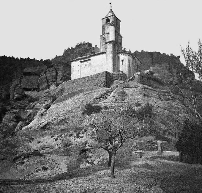 Vista general de l'església de Santa Maria de Cervelló. Josep Salvany i Blanch (1923)